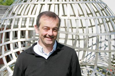 Foto di Martin Bridson